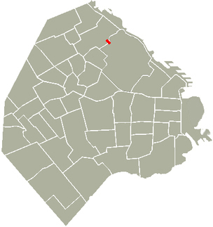 Túnel del Libertador